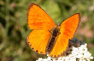 Lycaena virgaureae (Actual name Lycaena phlaeas)